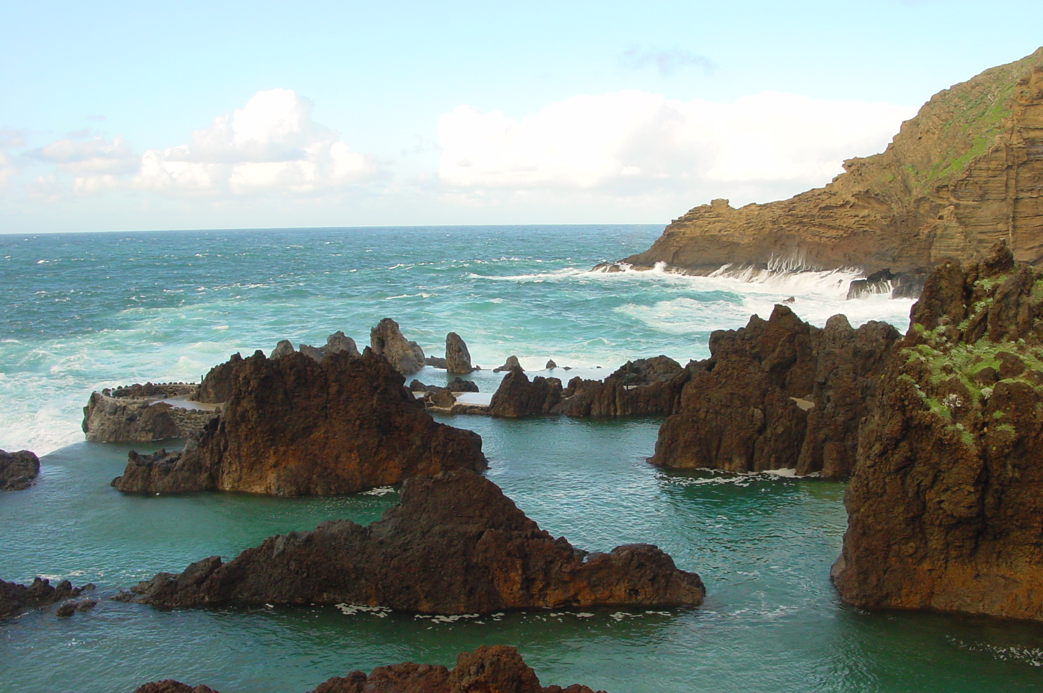 Ocean pool, Porto Moniz, Madeira